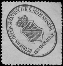 Sealing stamp Title: Betriebs-Oberinspektion der K.S. Staatseisenbahn Dresden-Altstadt Description: schwarz, weiß Place: Dresden size: 3x3 cm